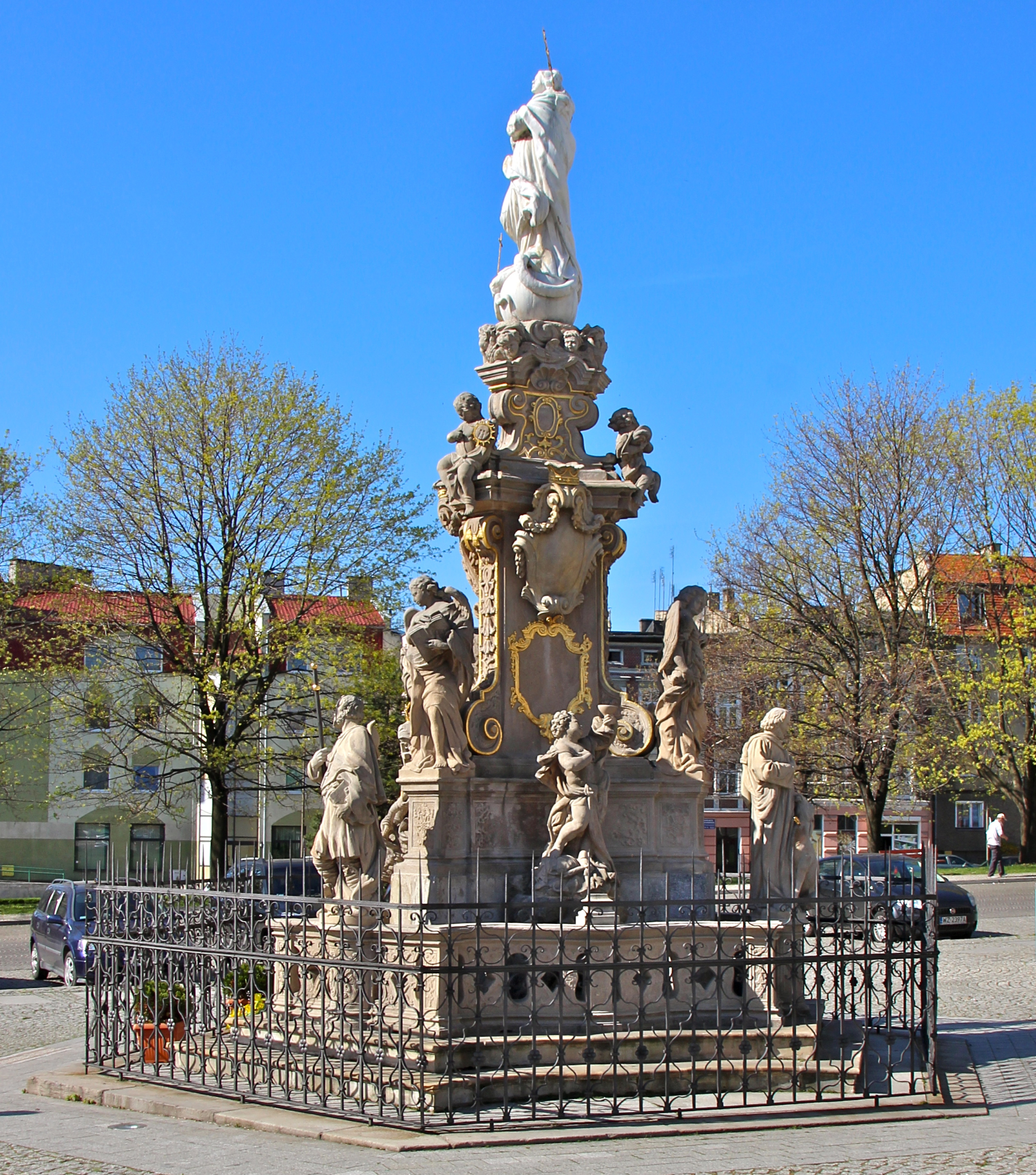 Głubczyce - miasto w Polsce położona w województwie opolskim, w powiecie głubczyckim.